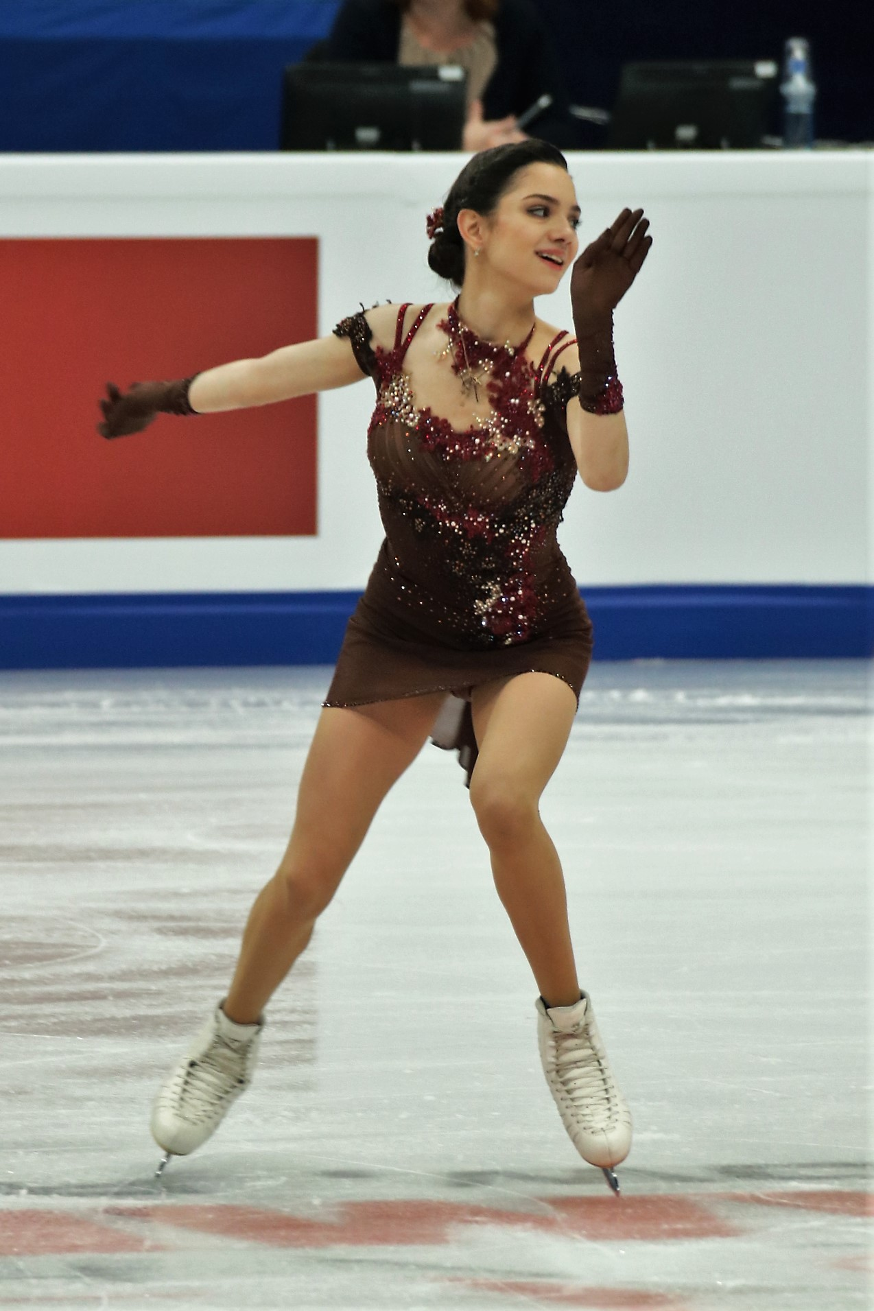 Евгения Медведева (Россия) на Чемпионате Европы по фигурному катанию 2018.